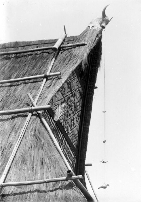 Negatief. Detail van een Karo-batak huis.